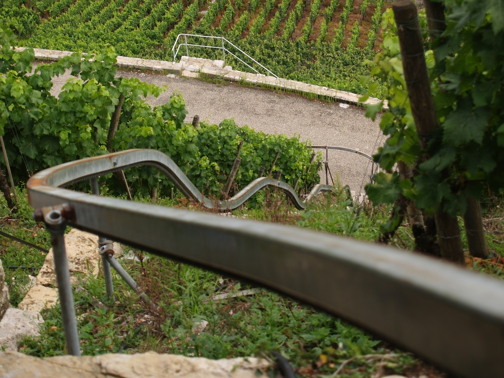 Trasse einer Monorackbahn bei Mundelsheim (Landkreis Ludwigsburg)